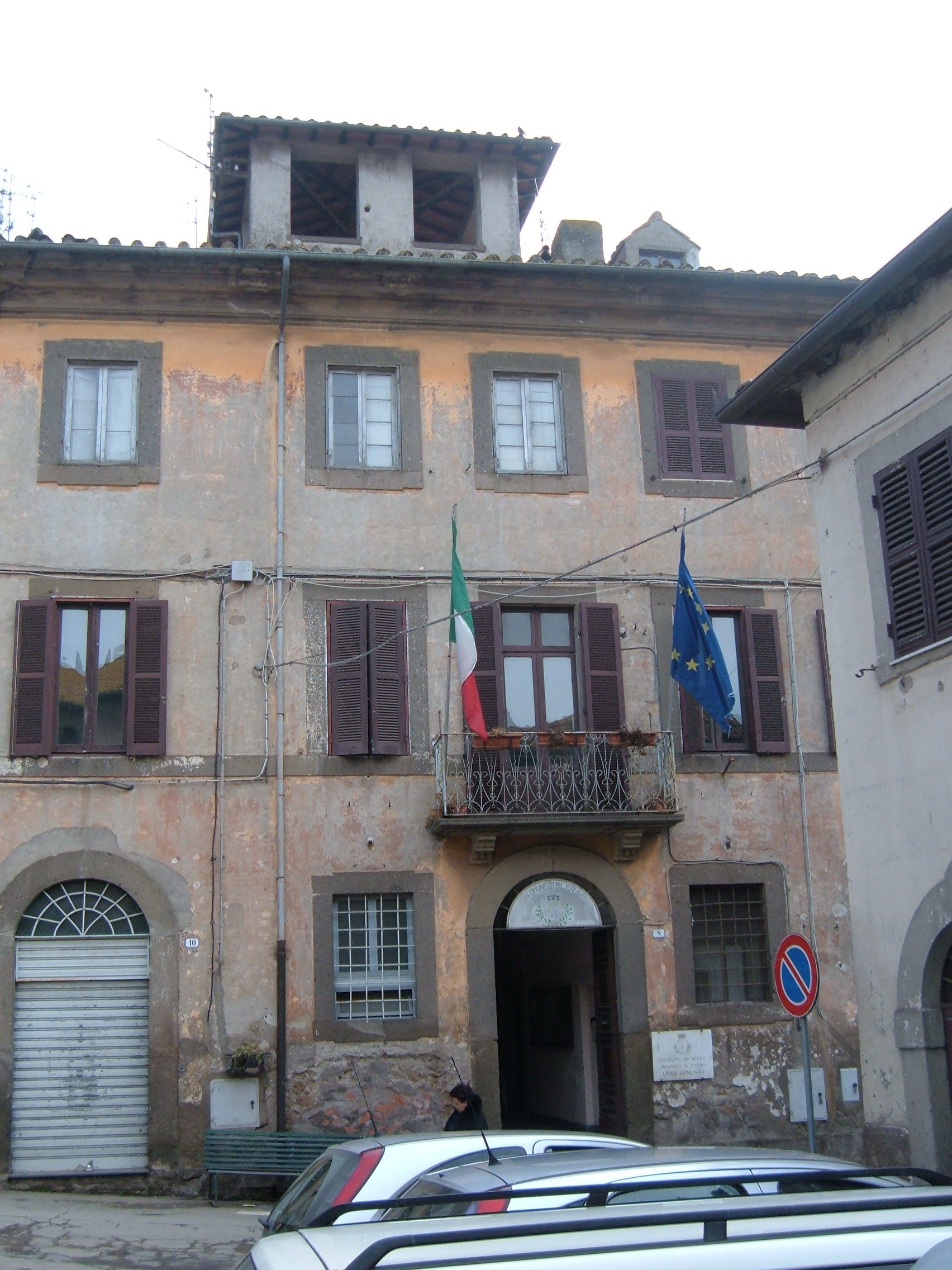 Palazzo comunale di Blera (Viterbo)